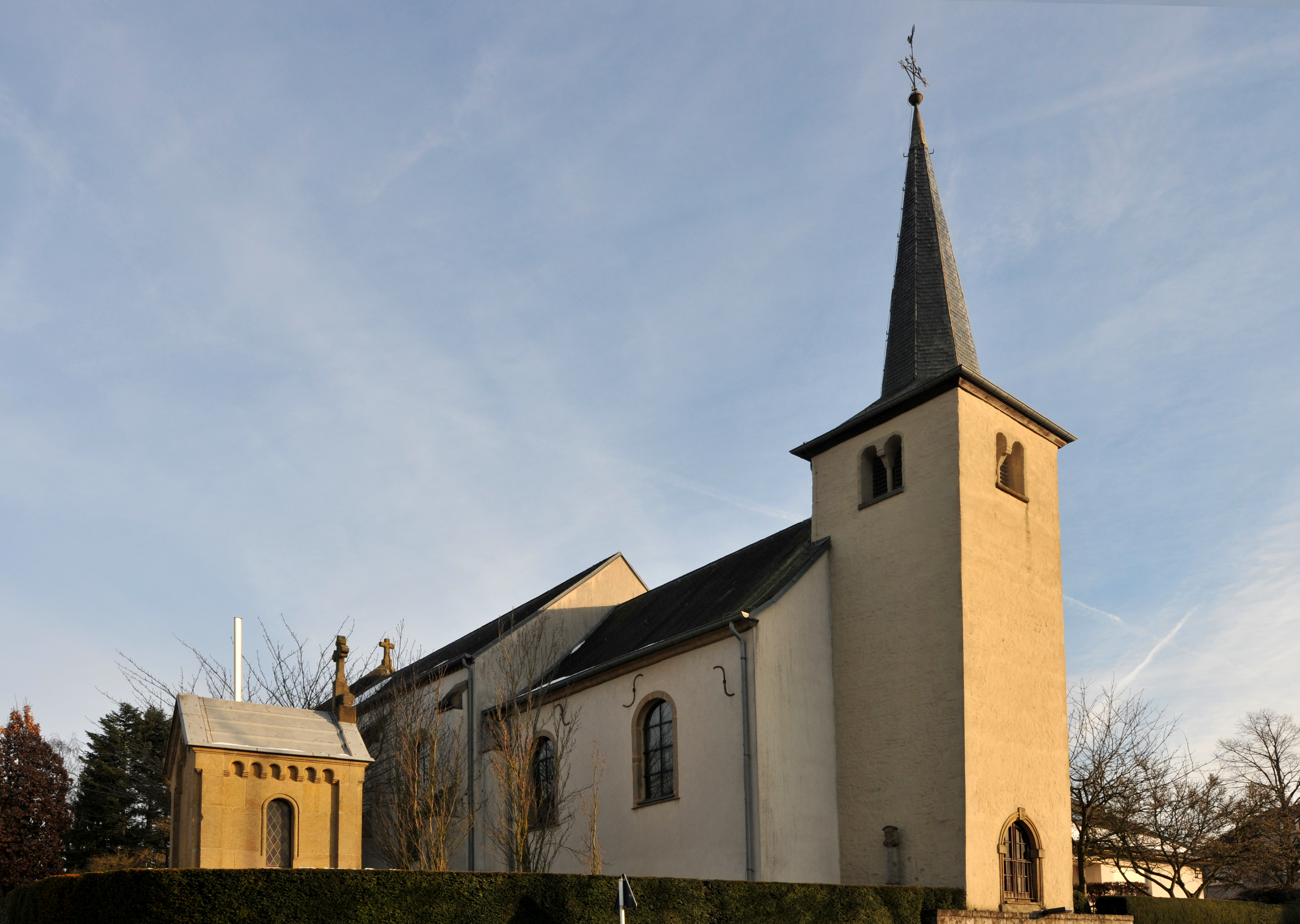 D'Jousefskierch zu Alzeng.